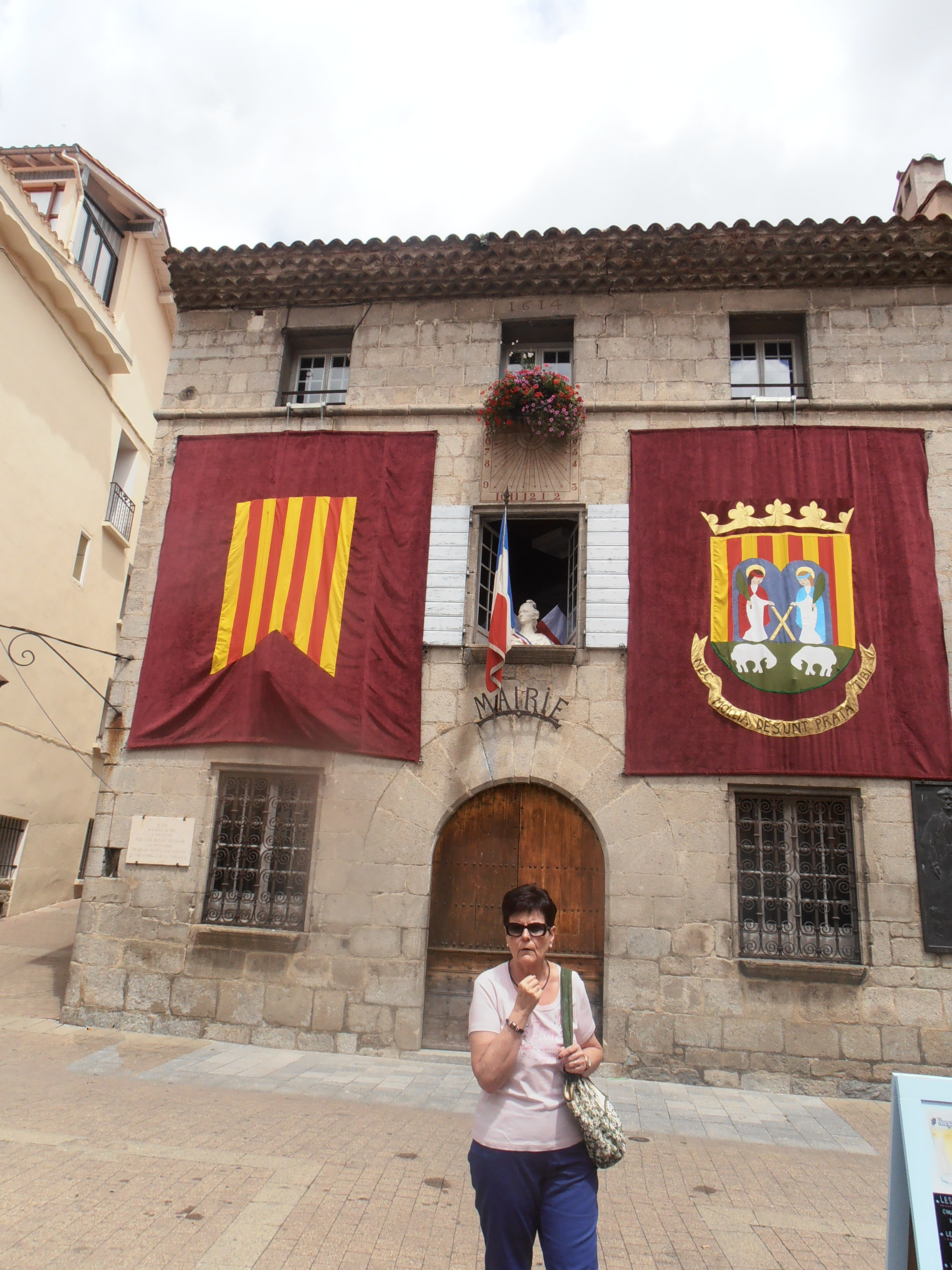 L'ajuntament (Mairie)